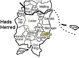 Kort der viser Halling Sogn, Hads Herred, Århus Amt, Denmark.